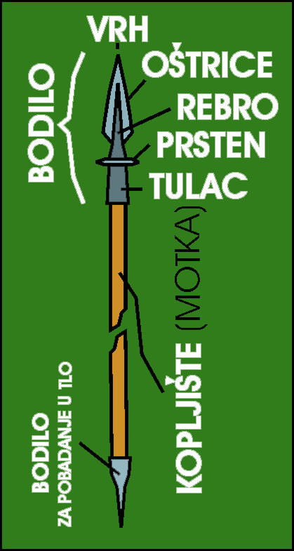 Djelovi koplja.